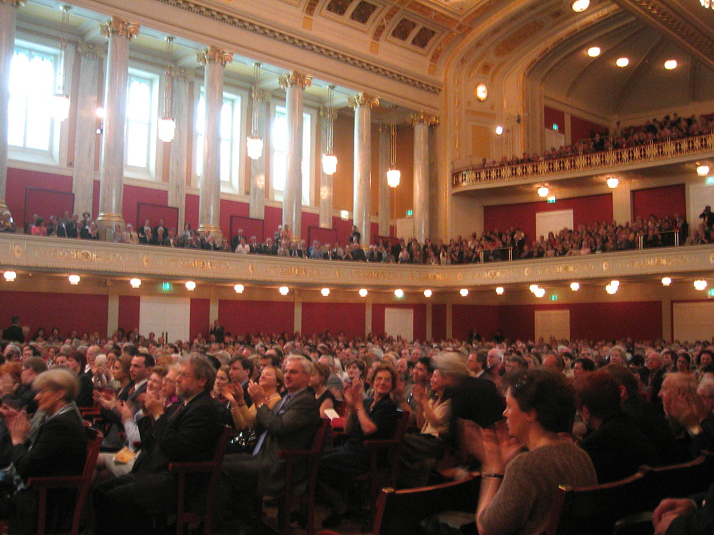 Wien, Austria: Konzerthaus, Großer Saal (Great Hall)